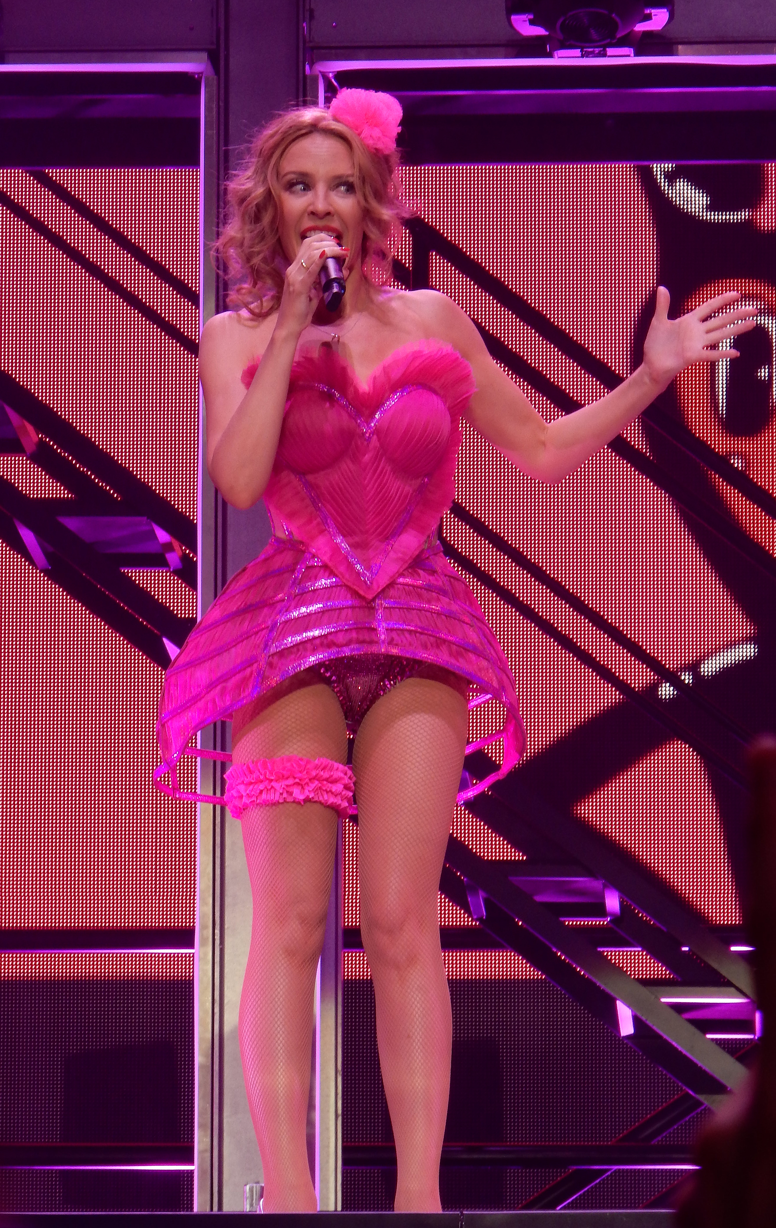 Kylie Minogue - Kiss Me Once Tour - Manchester - 26.09.14. - 098